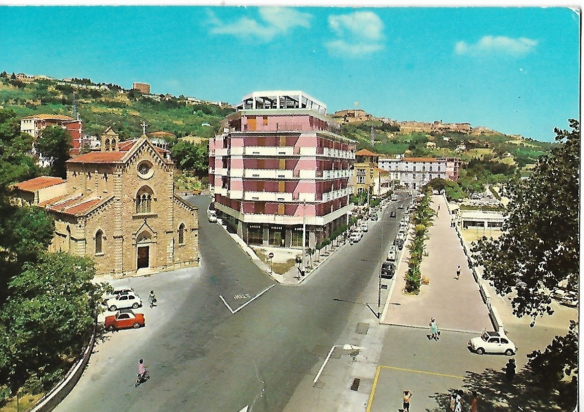 Vasto - Chiesa Stella Maris e lungomare